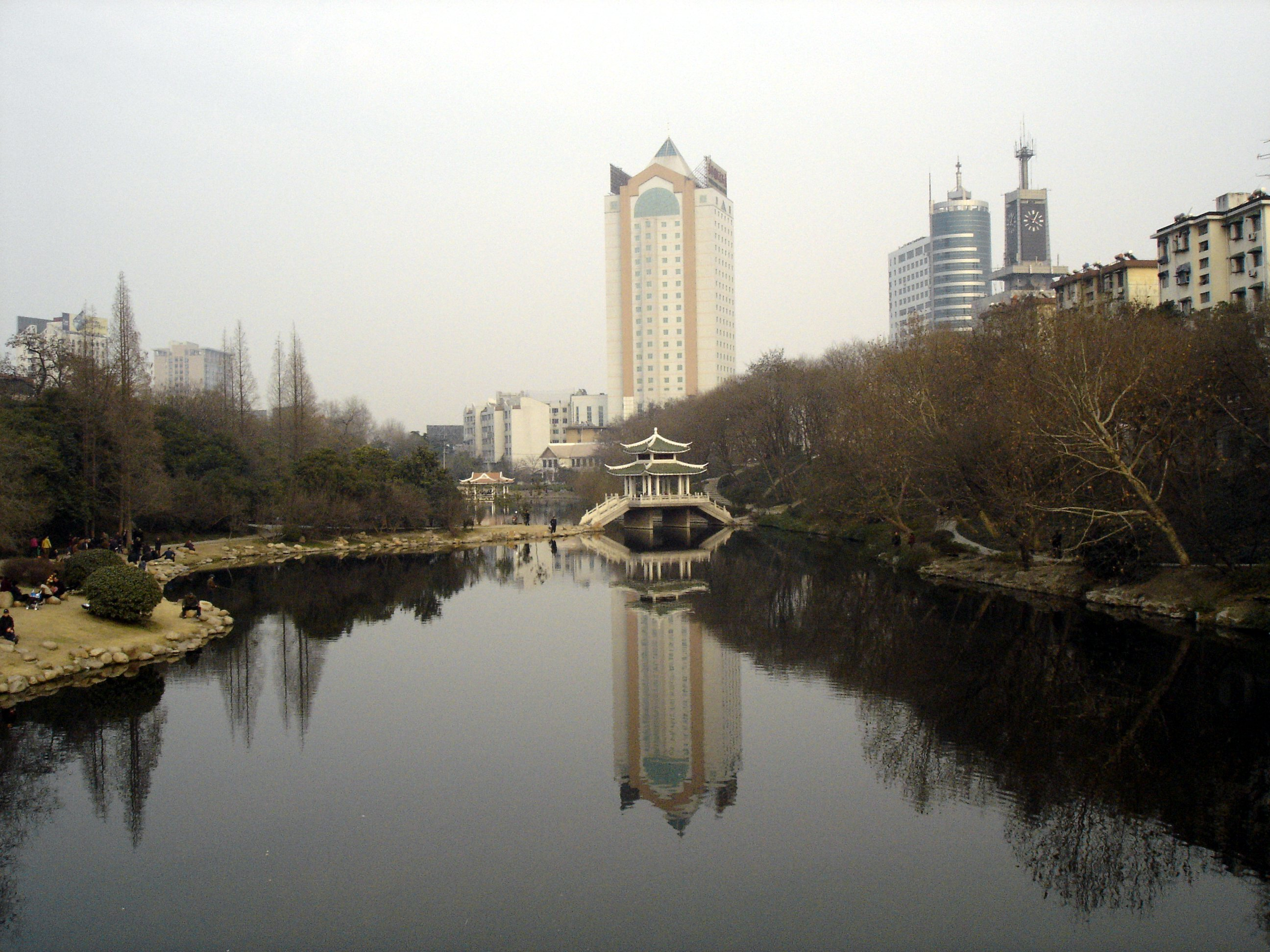 Yinhe Park,Hefei,Anhui,PRC 中国合肥银河公园